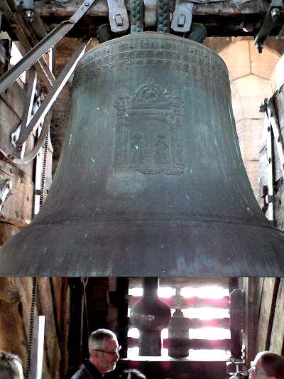 Tagmessglocke (d') der Lorenzkirche, Nürnberg